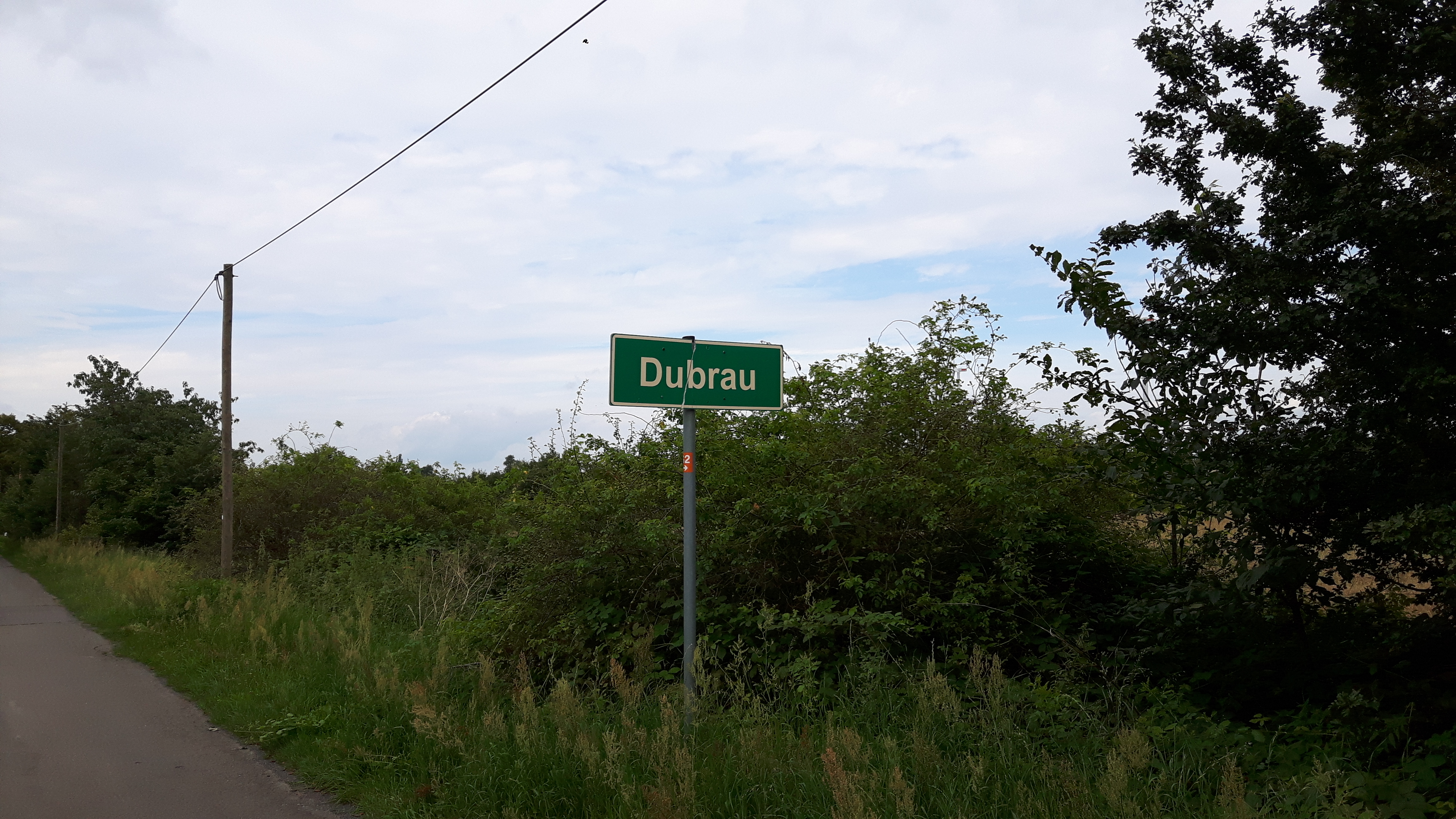 Ortseingang von Dubrau bei Vetschau mit altem Verkehrszeichen aus DDR-Zeiten.